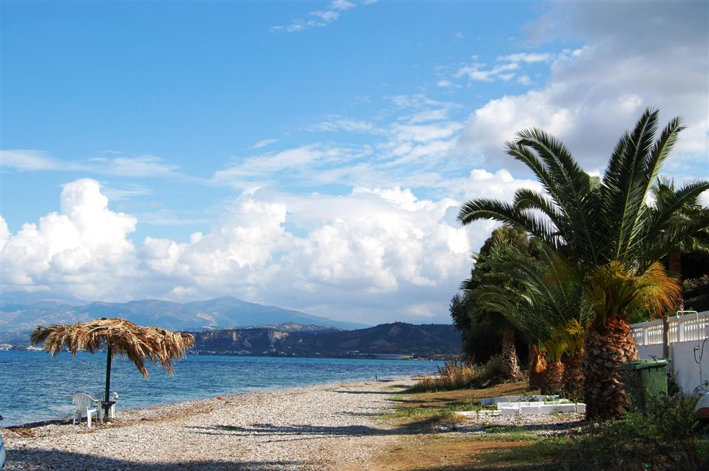 Het strand van Kato-Alissos, een plaatsje ten zuid-westen van Patras in Griekenland.